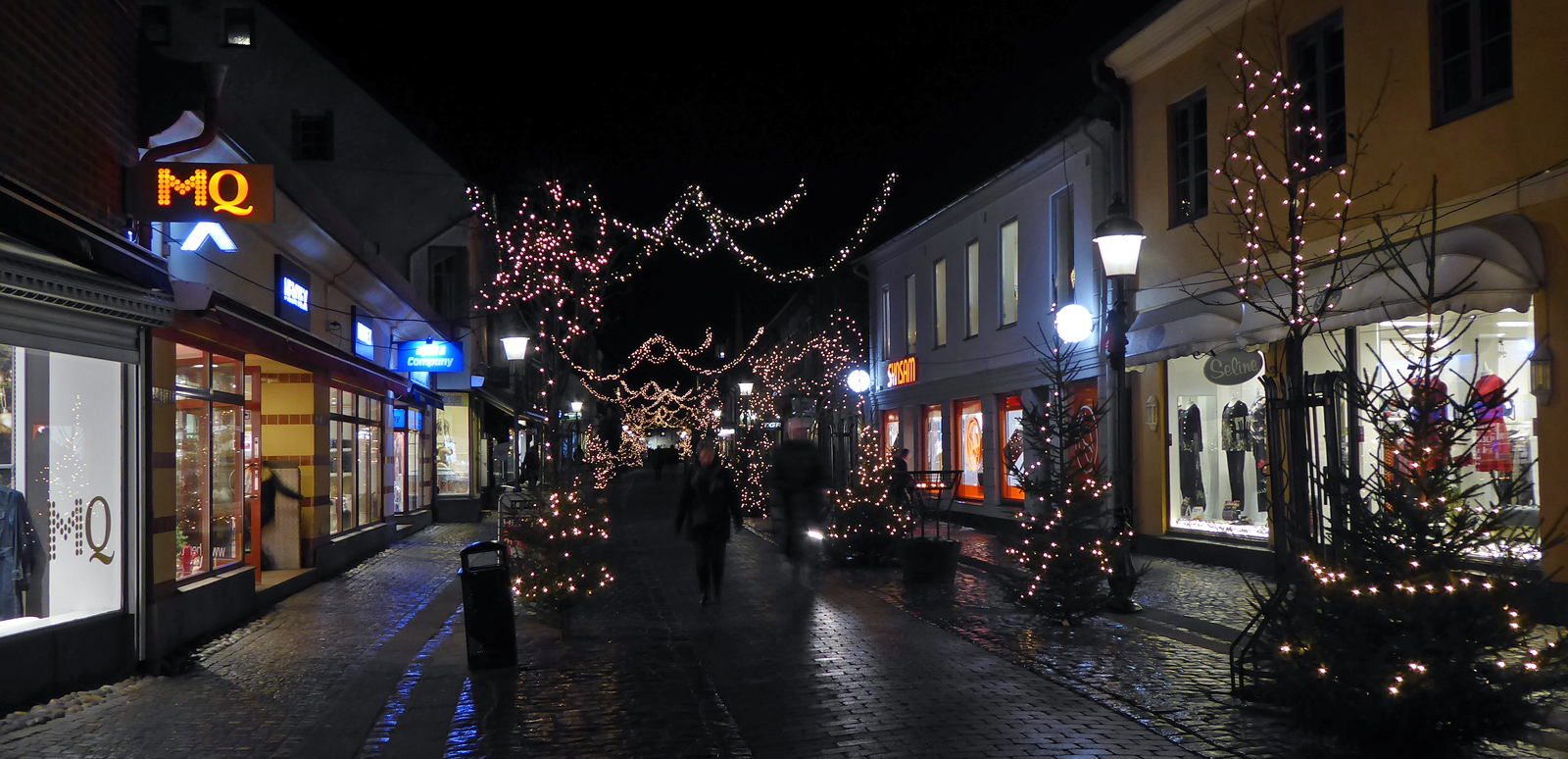 Stora Östergatan i Ystad. 18:00. 29 november 2016.